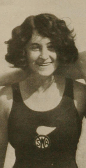 El Grafico del 14 de Marzo de 1925. Edicion 297